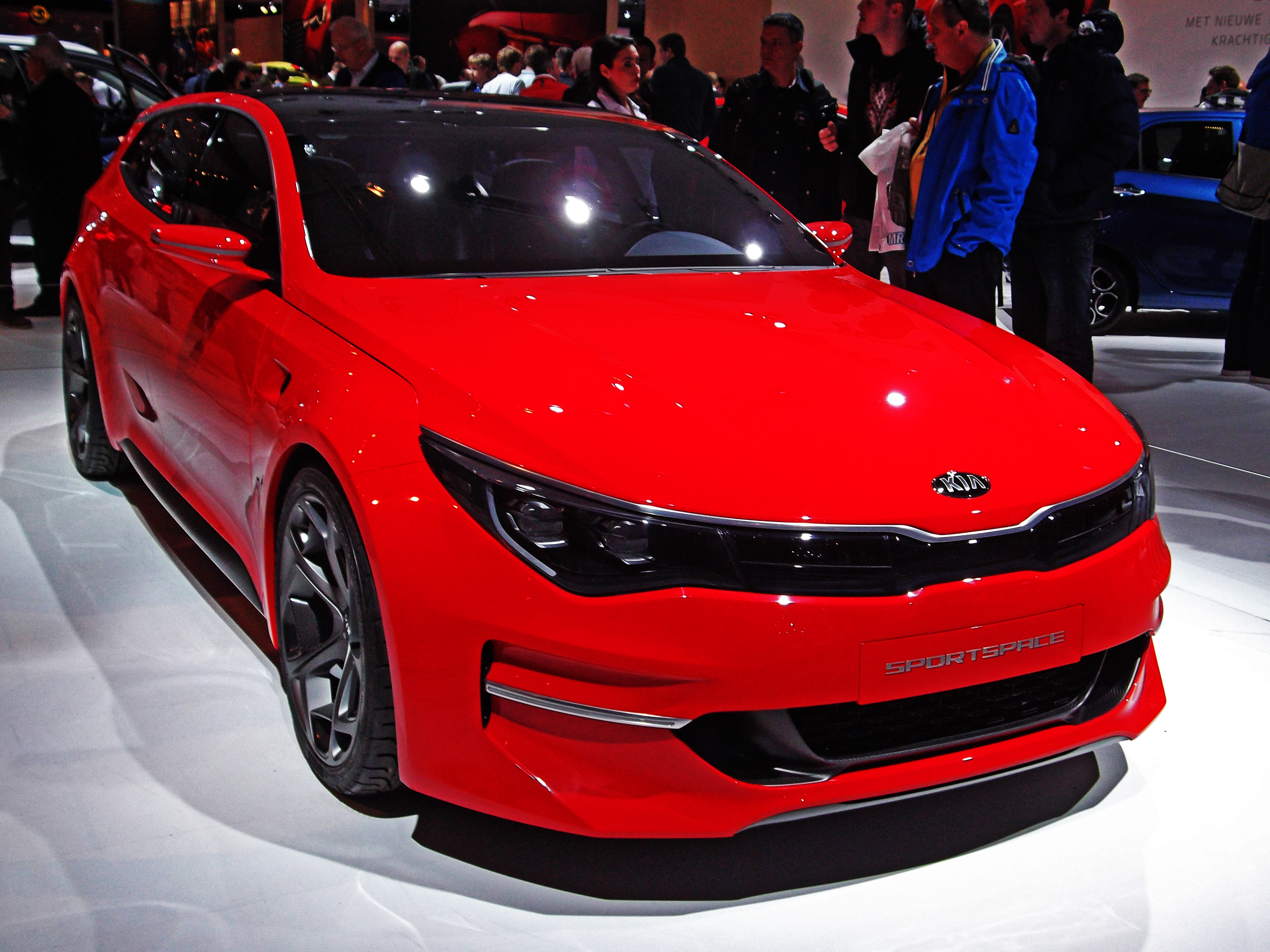 AutoRAI 2015.